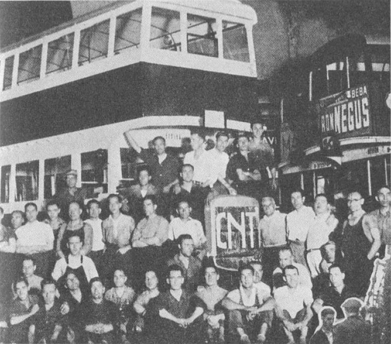 Barcelona 1936 - The first bus built in the workshops of the collectivized General Autobus Company - Barcelone 1936 - Le premier bus construit dans les ateliers de l'Entreprise Générale d'Autobus, collectivisée en 1936.